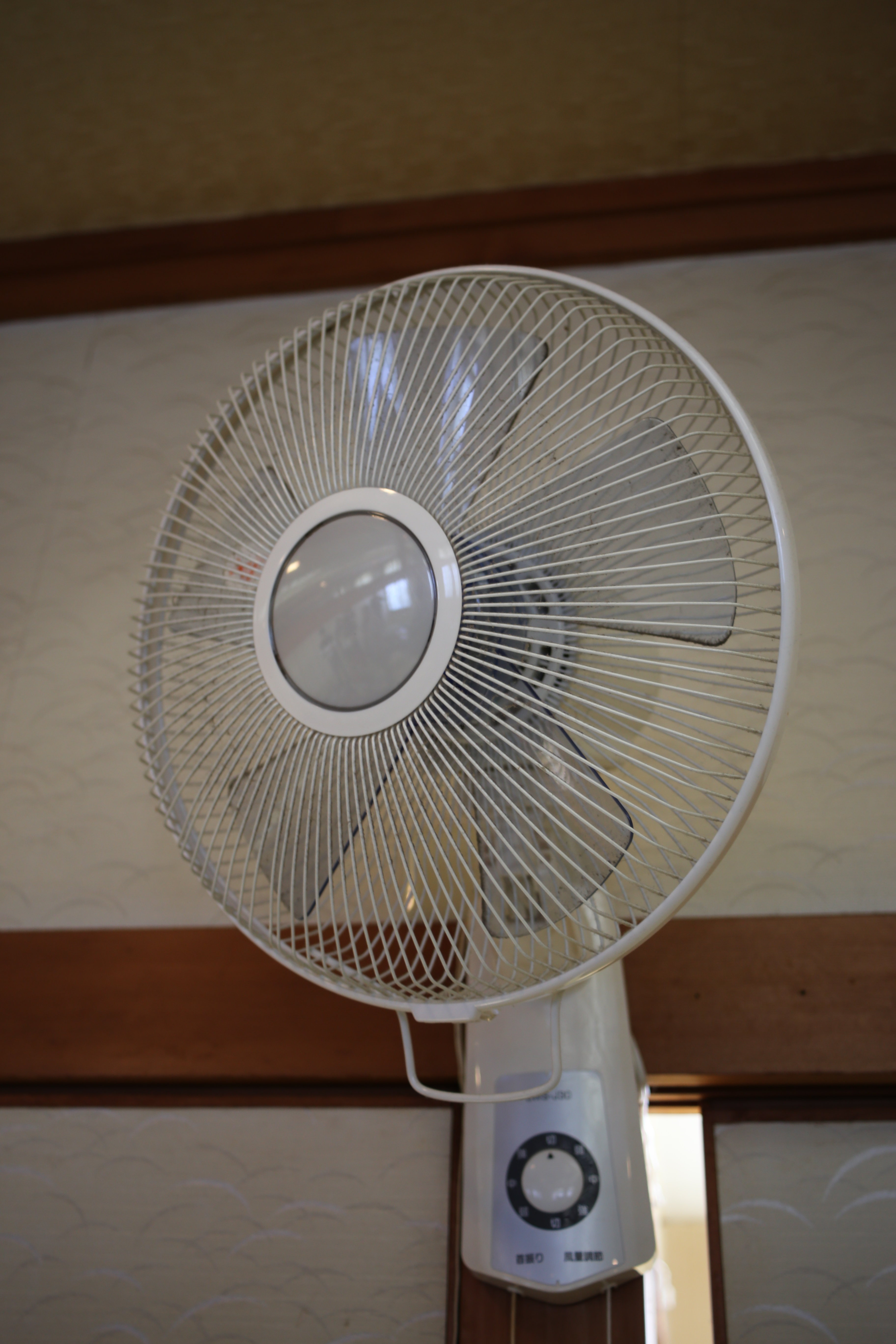 壁に設置するタイプの扇風機の一例